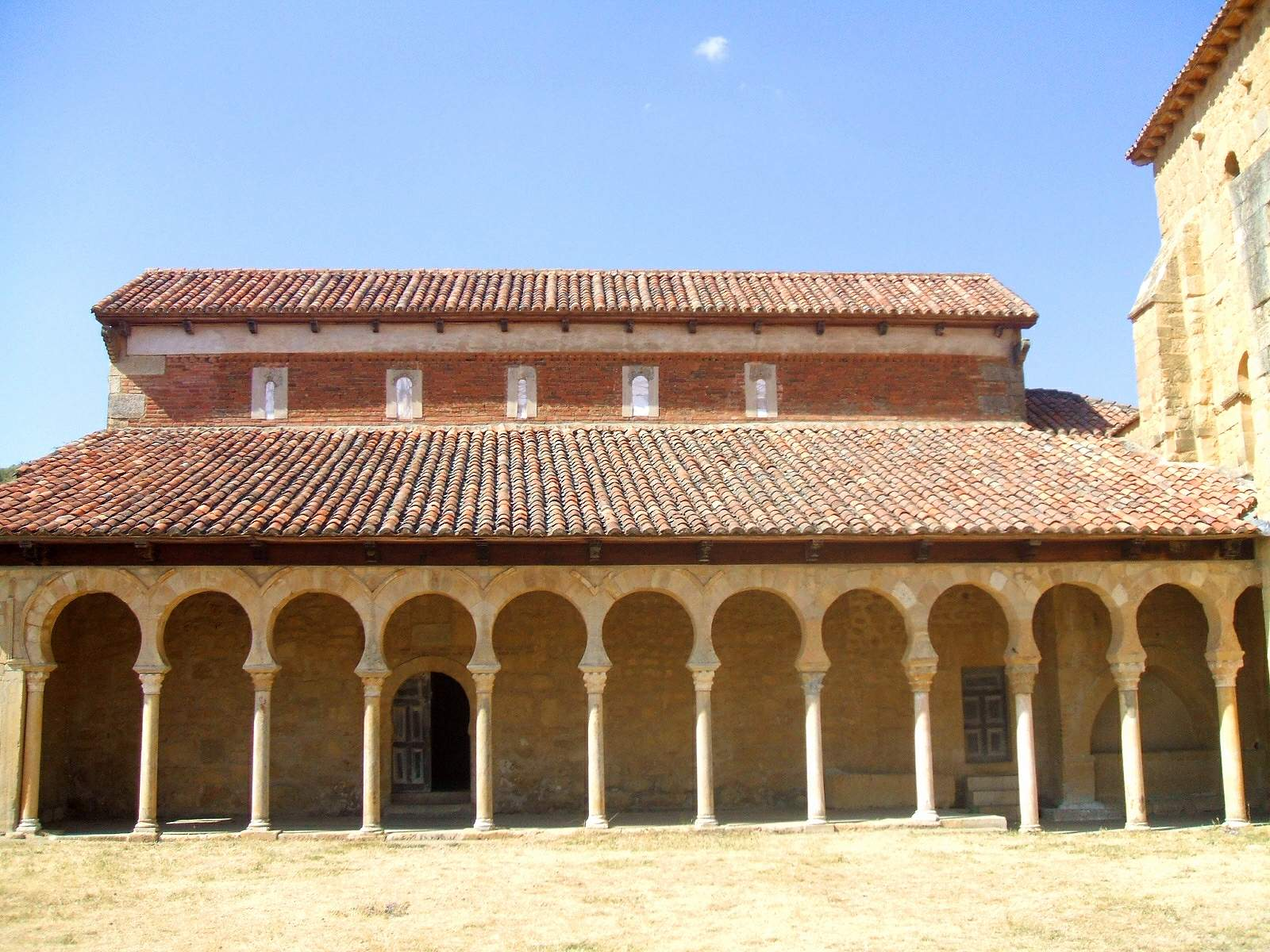 Monasterio mozárabe de San Miguel de Escalada (León).